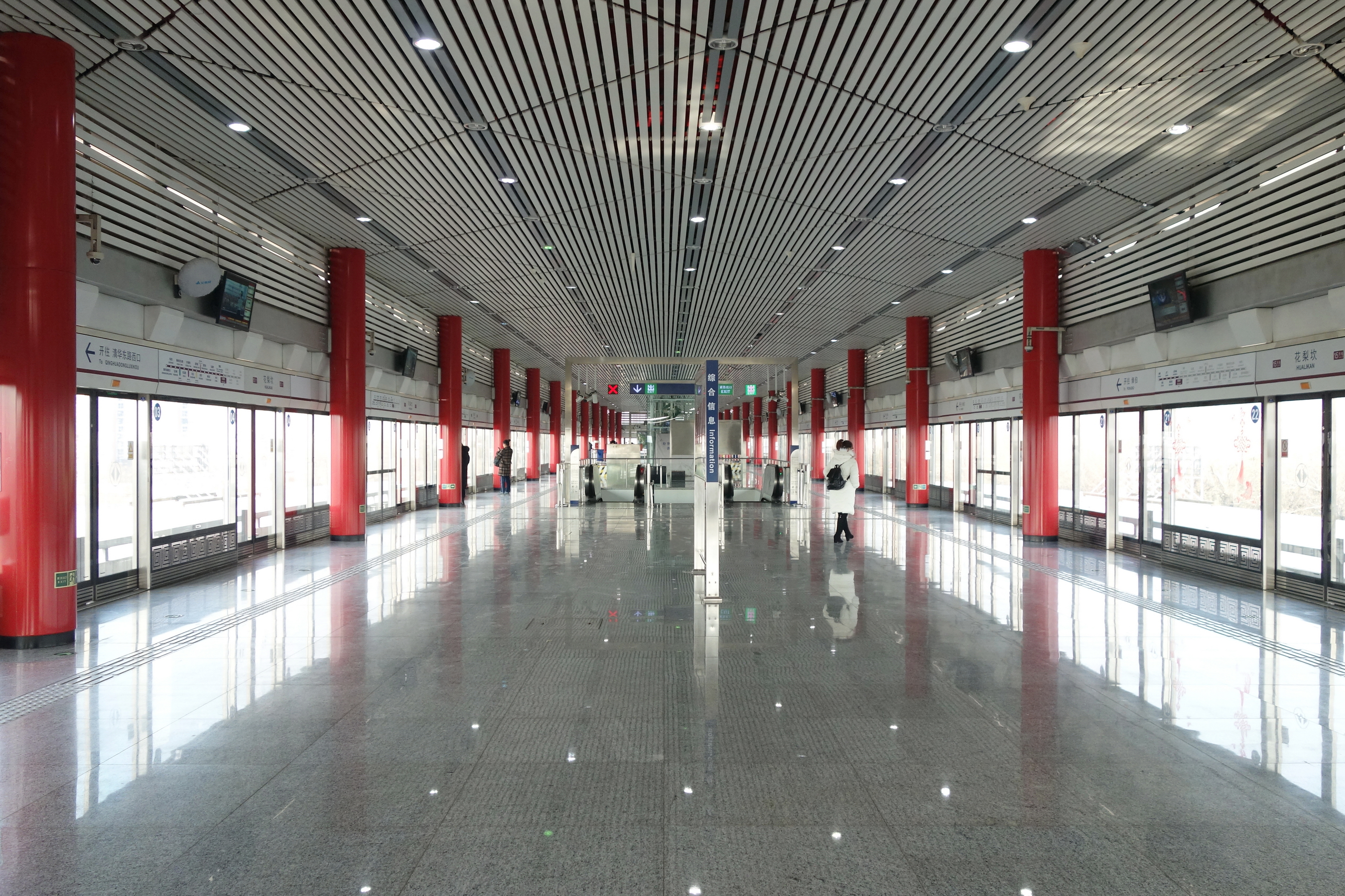 北京地铁15号线花梨坎站站台